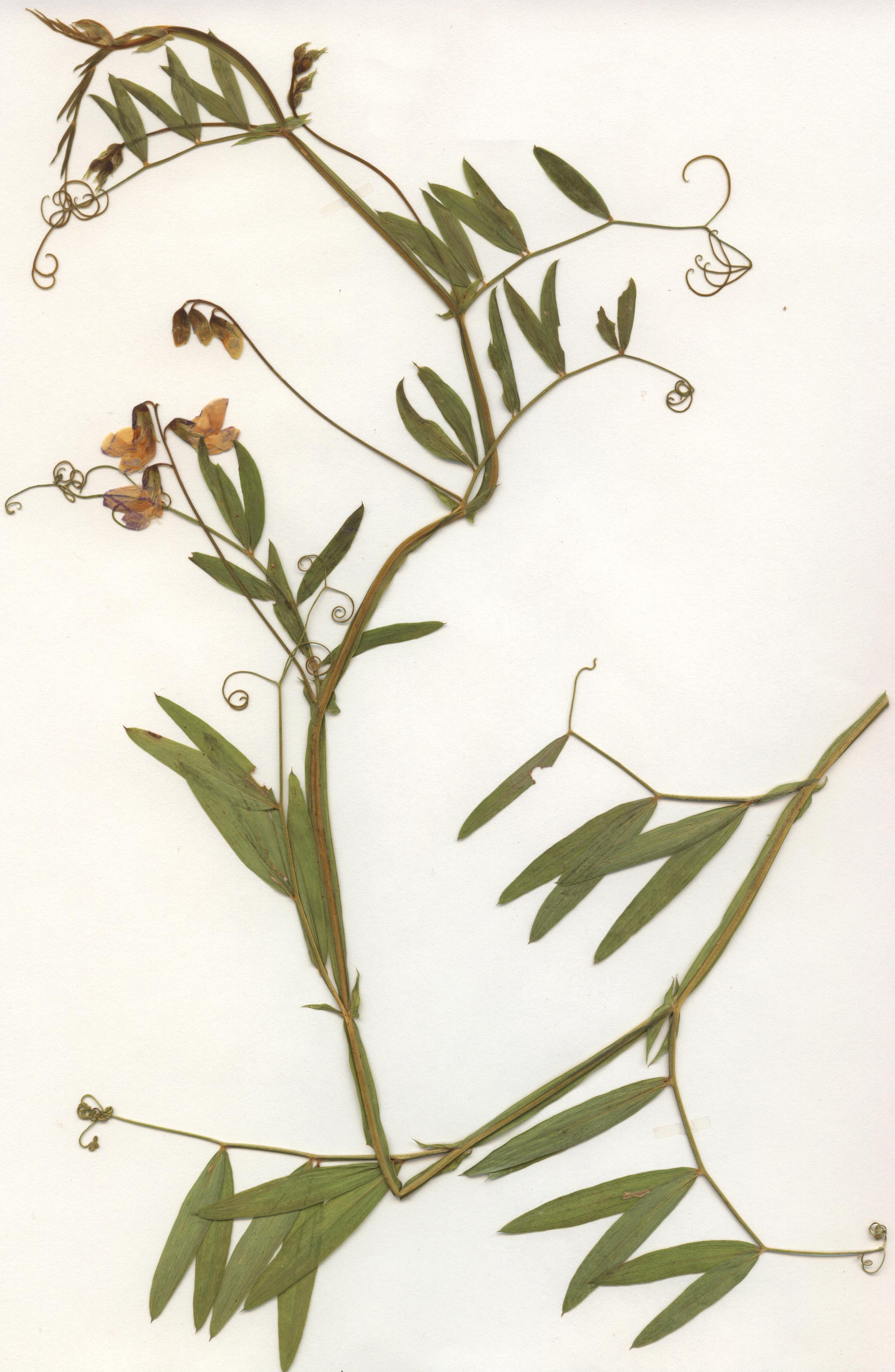 Lathyrus palustris, eigener Herbarbeleg vom 2. Juli 1984 - Fundort: Unterfranken (exakter Fundort wurde retuschiert zum Schutz des Standorts) – Hinweis: Das Sammeln bzw. Herbarisieren dieser Art ist nach der aktuellen Bundesartenschutzverordnung in Deutschland streng verboten und kann mit empfindlichen Geldstrafen geahndet werden.